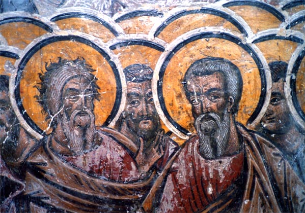 Фреска в църквата "Успение Богородично", Еани, Гърция.